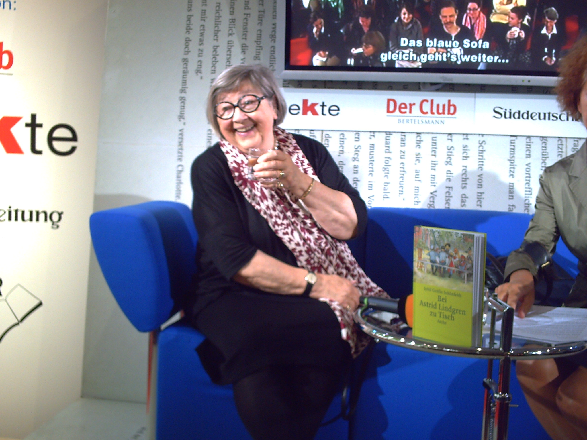 Sybil Gräfin Schönfeldt auf dem Blauen Sofa der Frankfurter Buchmesse, mit ihrem neuen Buch: Bei Astrid Lindgren zu Tisch.